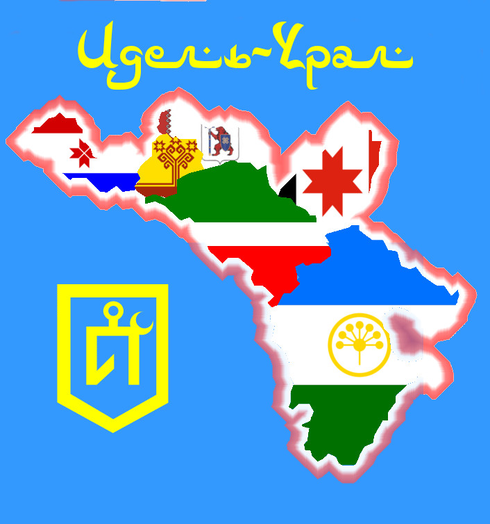 Карта республик Идель-Урала